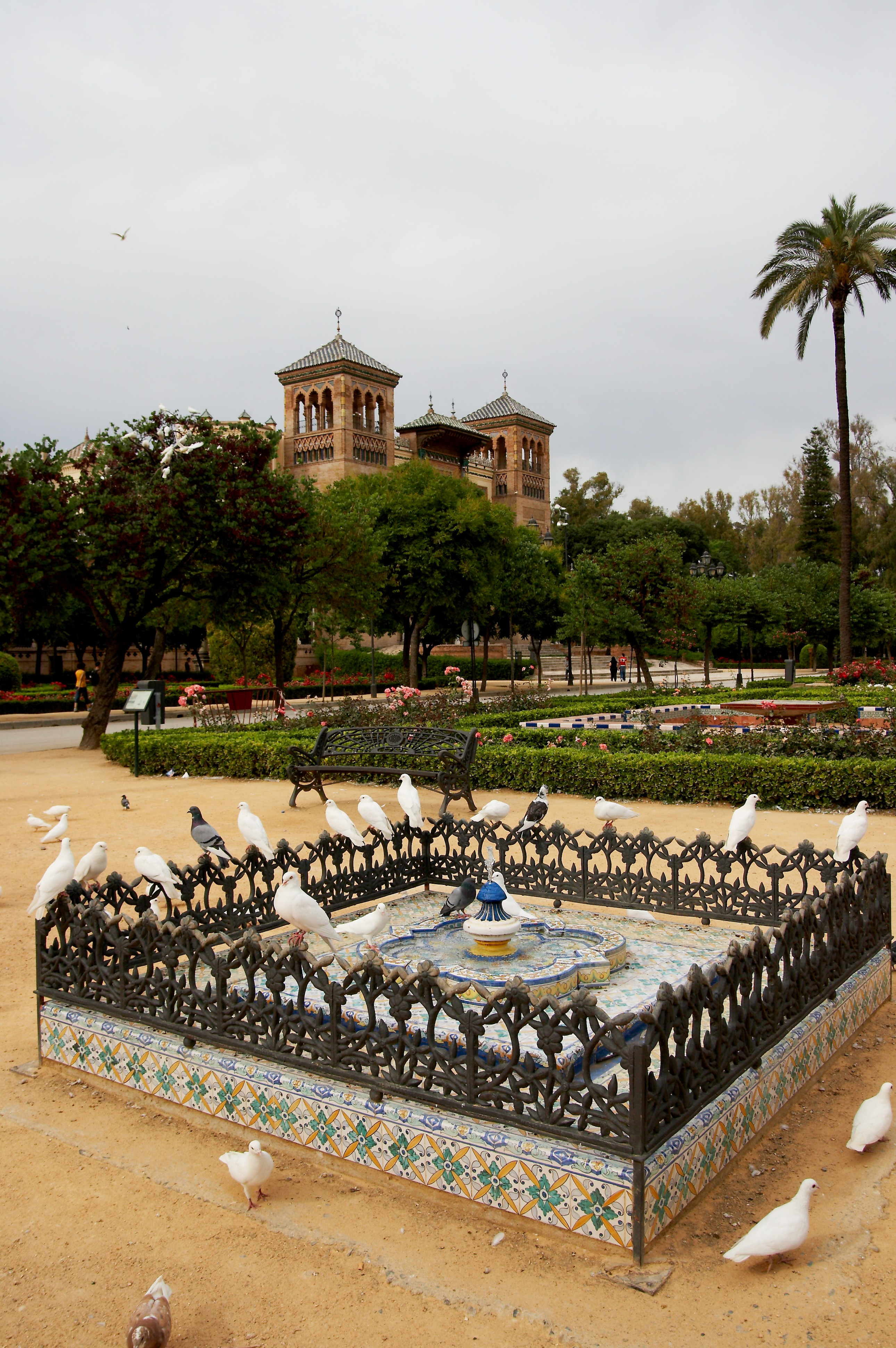 Plaza de América, Sevilla, España.